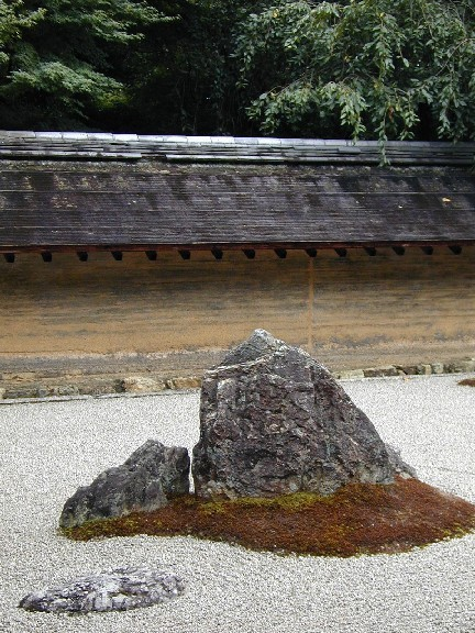 Ryoan-ji La foto è stata scattata da me a Kyoto (Giappone) il 15 agosto 2002 alle 17. Categoria:Immagini del Giappone